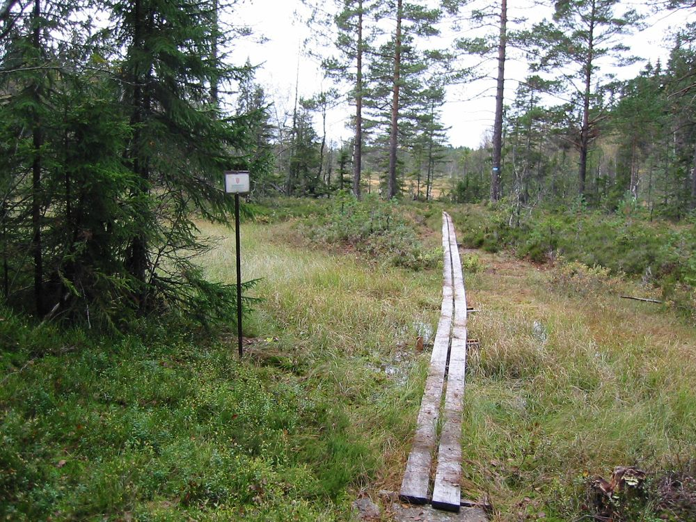 Tønsberg og Omegn Turistforening har sommerløype med klopper over myra.